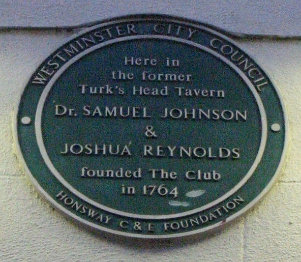 Nrf: Pliaque à Londres